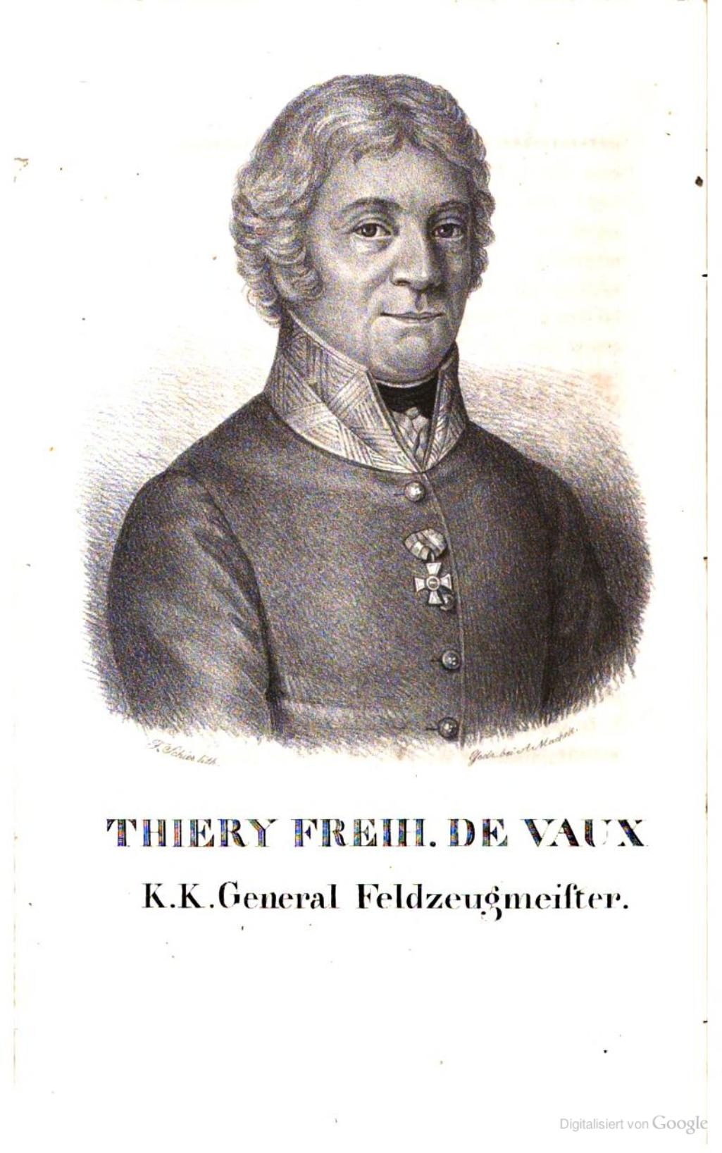 Thierry de Vaux, Freiherr, General-Feldzeugmeister, (* 4. Juni 1748 † 4. April 1820)